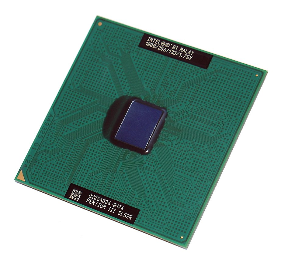 Processore Intel Pentium III (1 GHz Socket 370 Coppermine), lato die Intel Pentium III Processor (1 GHz Socket 370 Coppermine), die side Foto ed elaborazione personali / personal photo and editing